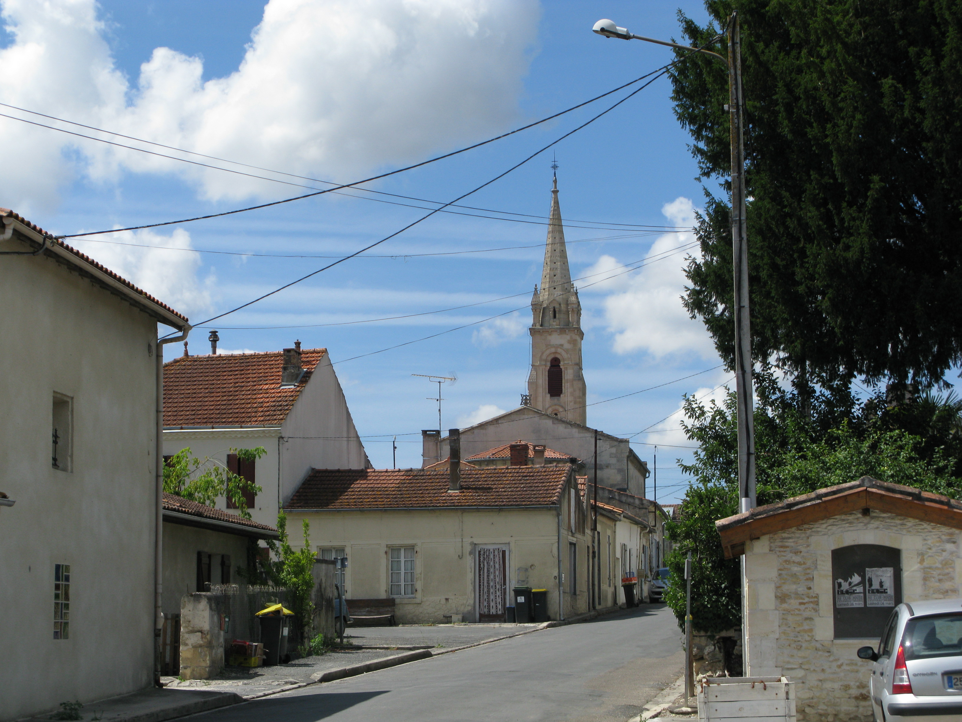 Vue générale du village d'Ordonnac, avec l'église en arrière plan